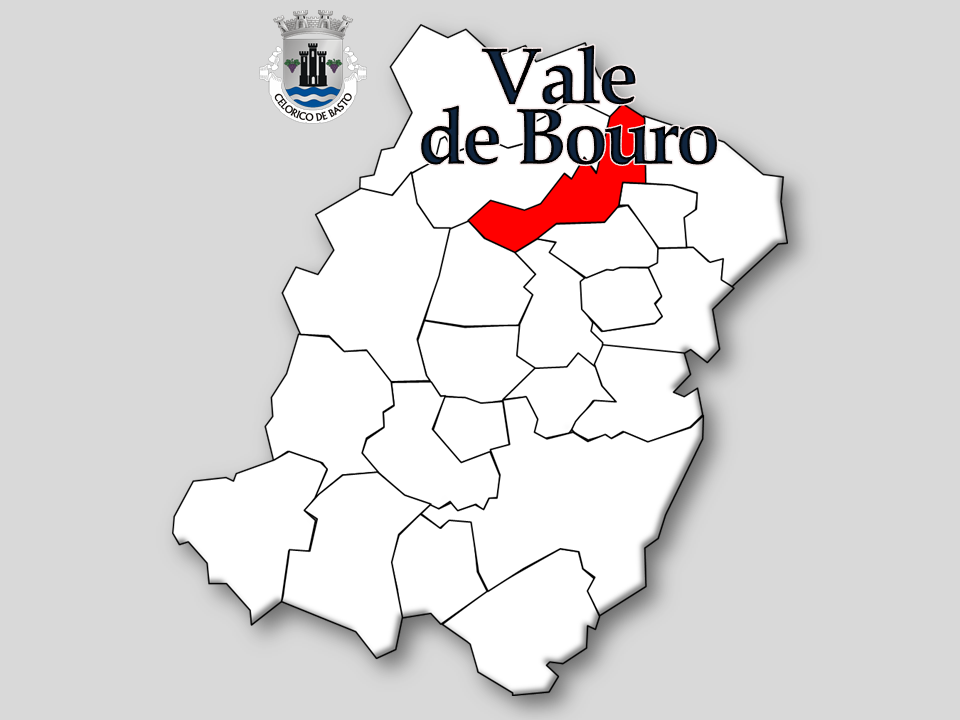 Censos 1864/2011